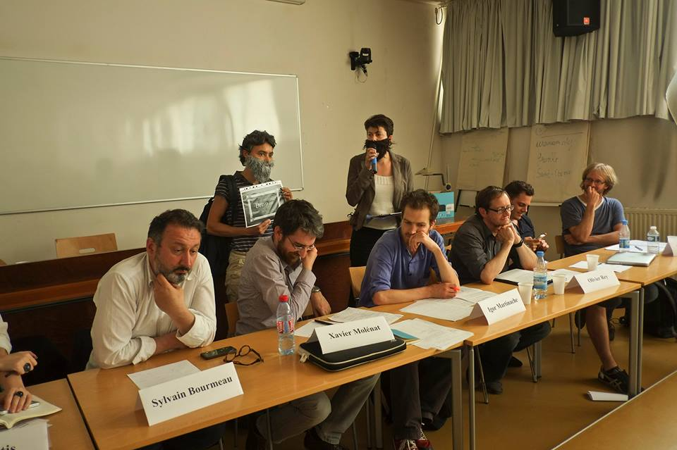 Barbage à l'Ecole normale supérieure de Lyon le 10 juin 2014 - action du groupe d'action féministe La Barbe